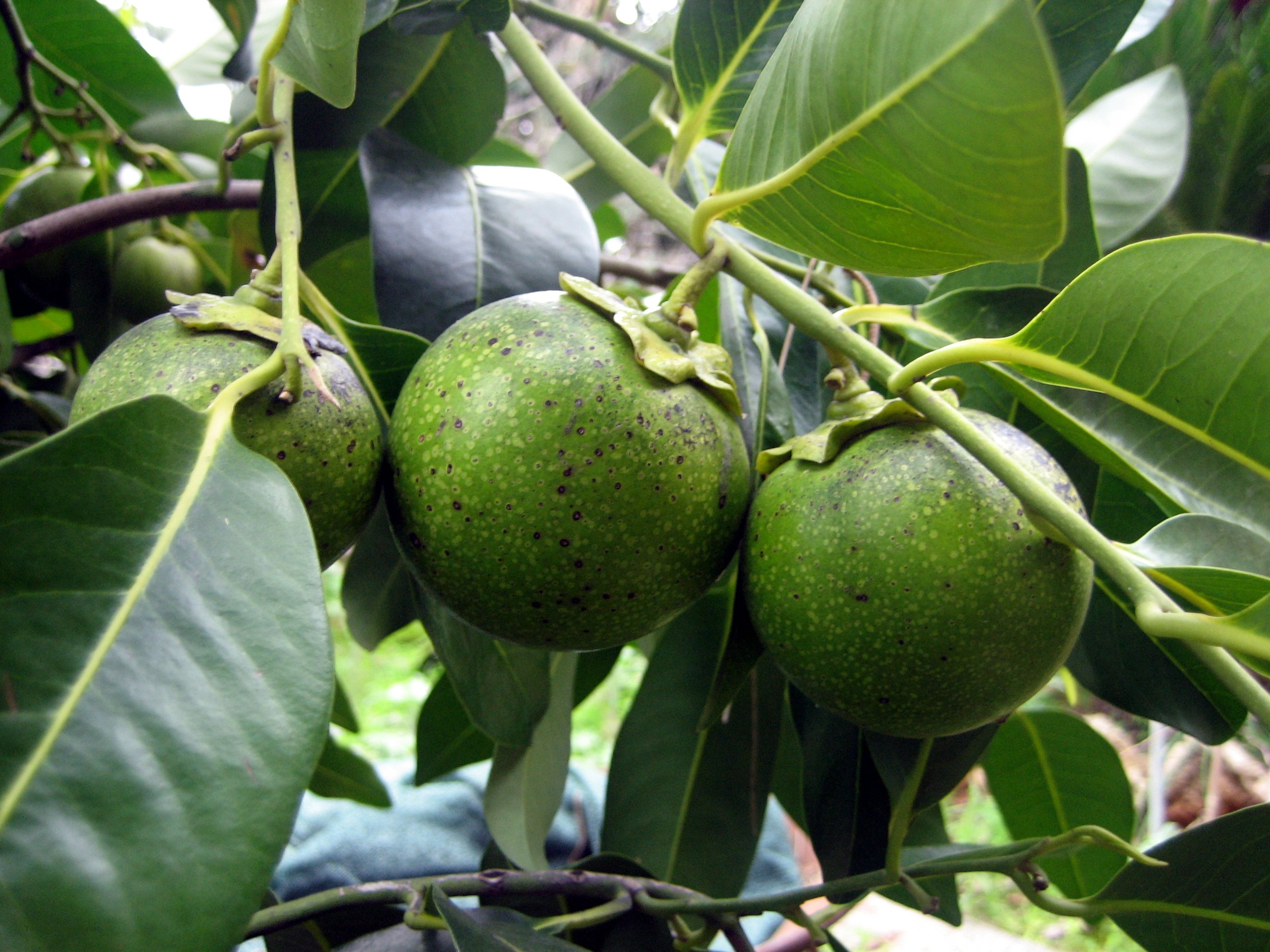 Black Sapote Picture #1